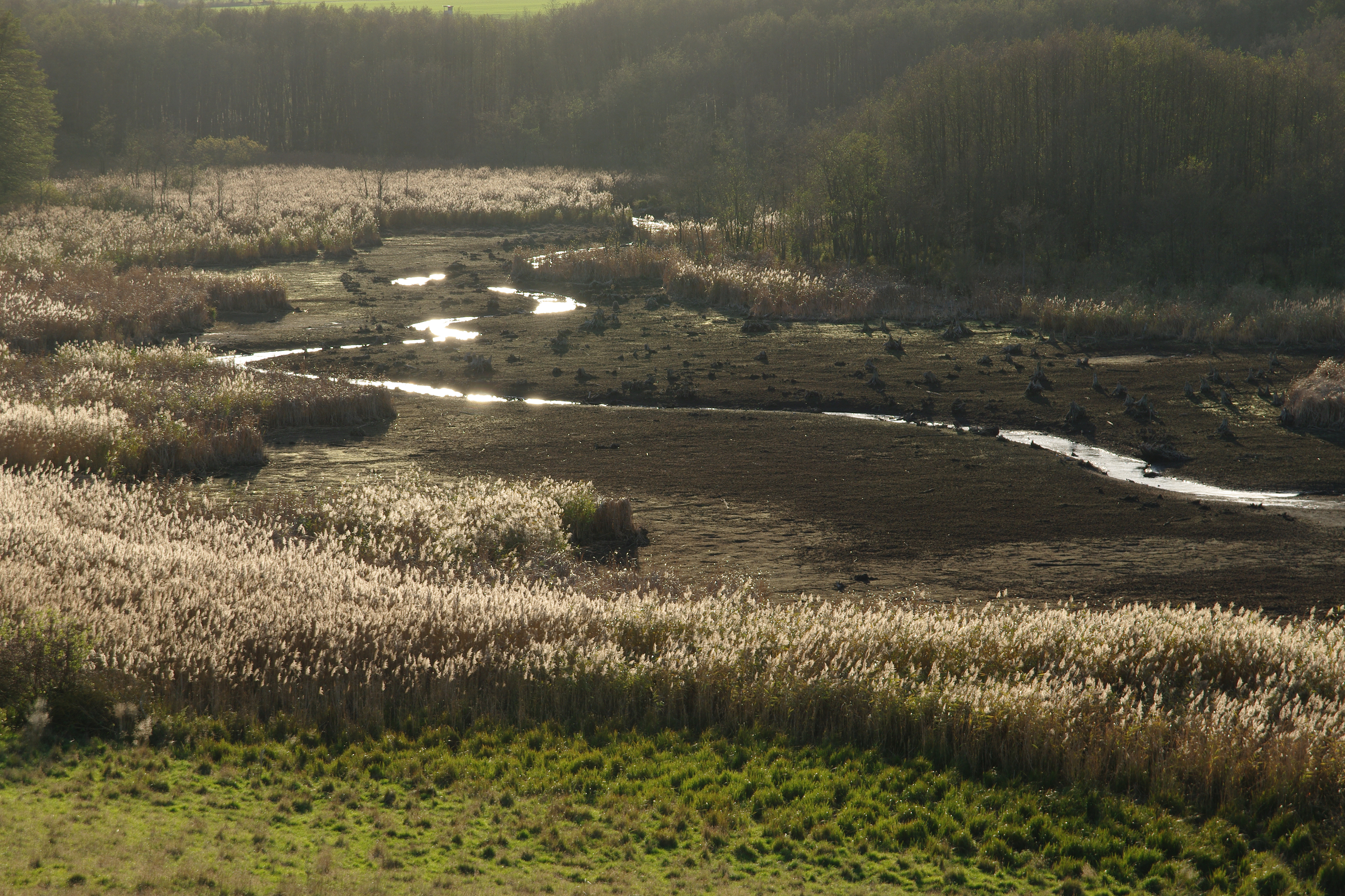 Im Herbst abgelassener Teich mit dem ursprünglichen Bett des Platkower Mühlenfließ' im NSG und FFH-Gebiet „Lietzener Mühlental“ bei Falkenhagen (Mark), Lkr. Märkisch-Oderland